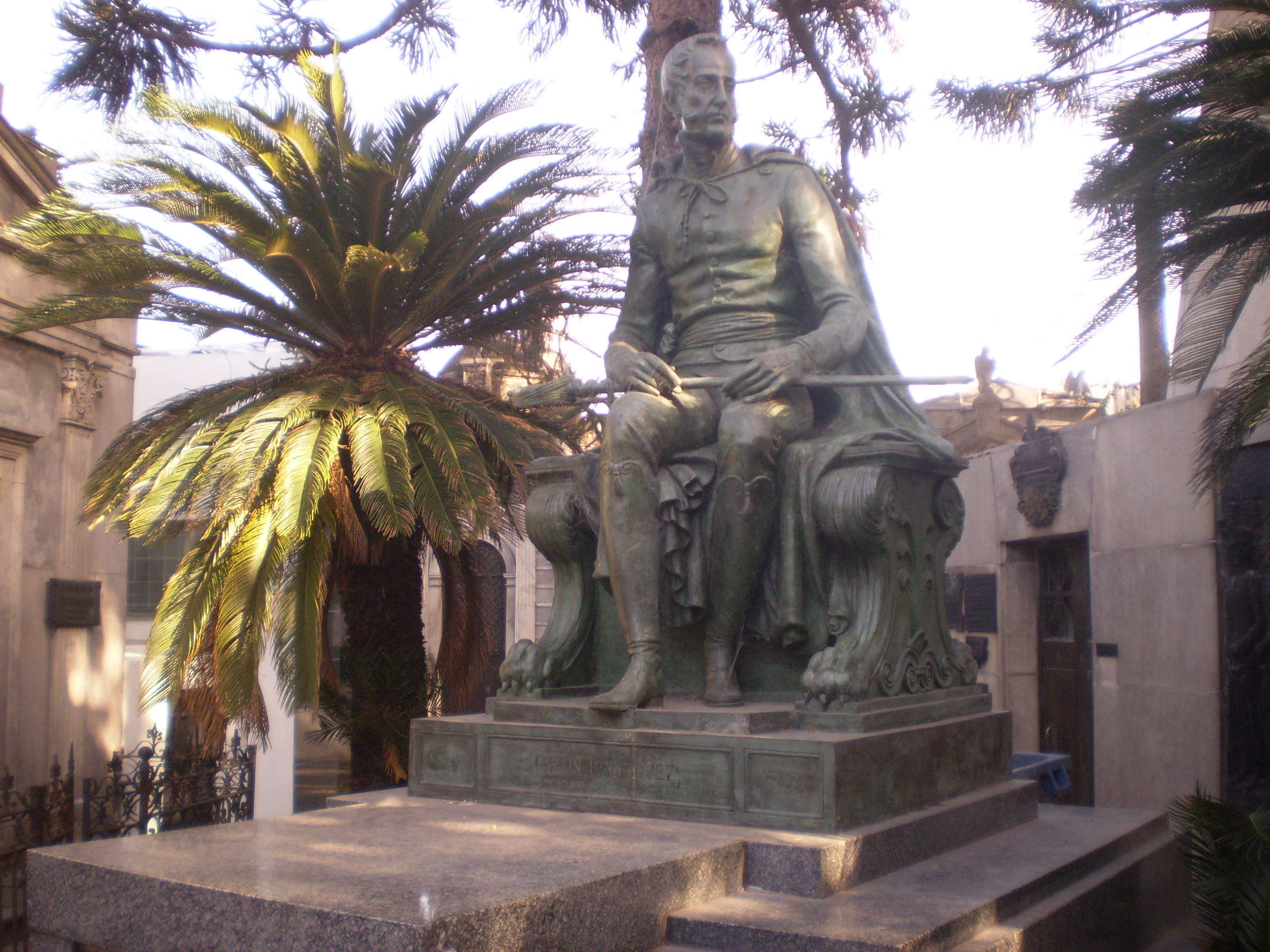 Tumba de Martín Rodriguez, Cementerio de la Recoleta, Buenos Aires